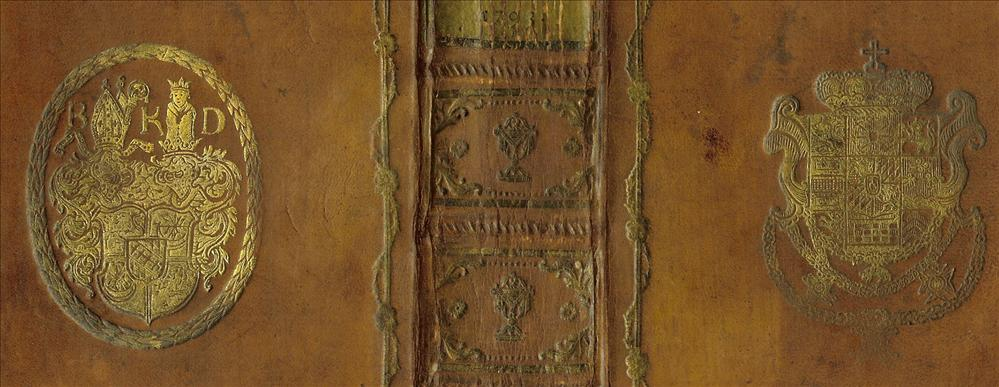 Einband mit zwei Supralibros; links: ? (Initialien "B K D"), rechts: wohl Pfalz-Neuburg o. ä.